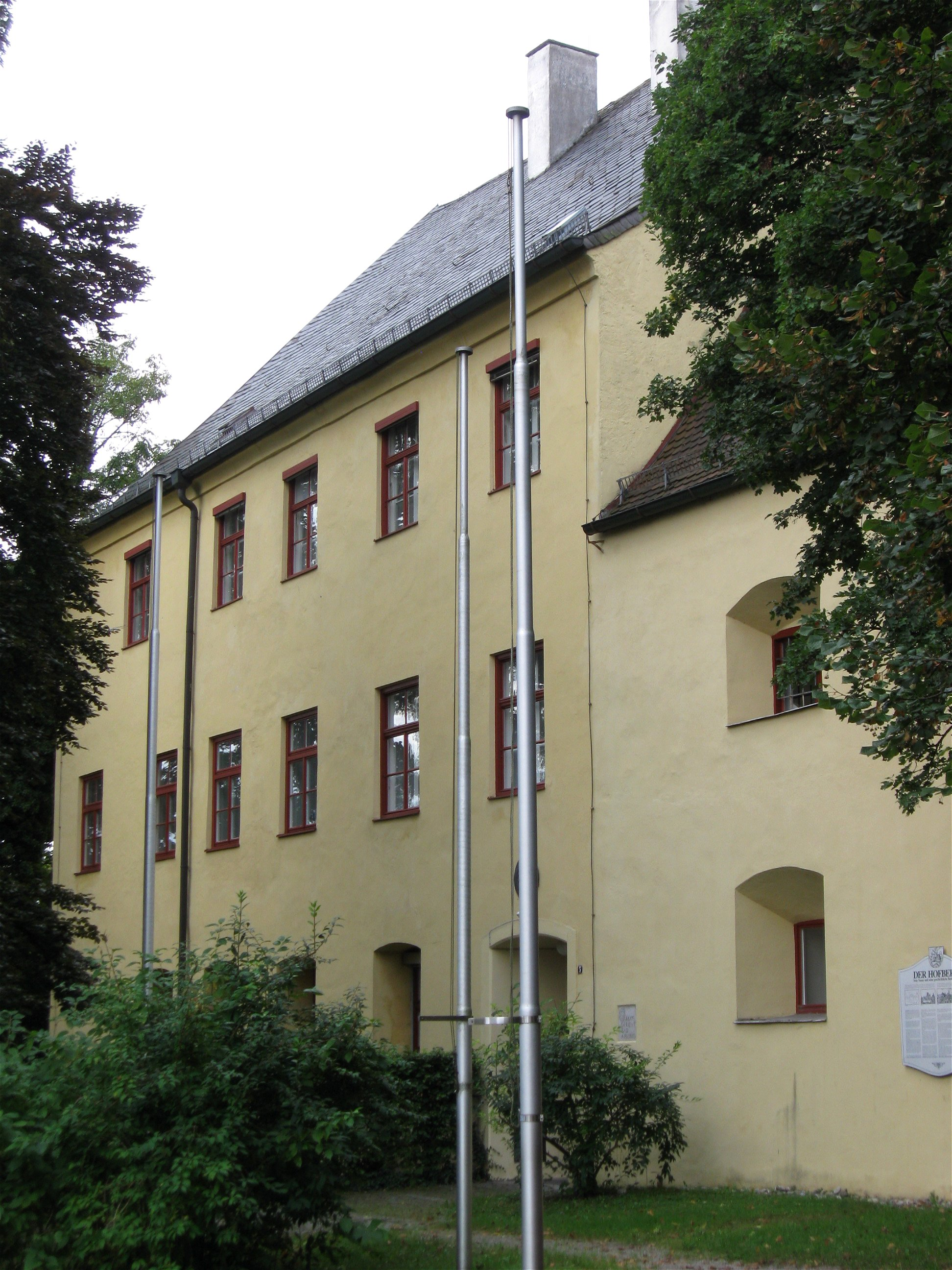 Hofberg 5; Hofberg 6. Ehem. Burg, ehem. Rentamt jetzt Amtsgericht, zwei große zusammengeschlossene dreigeschossige Putzbauten mit Satteldächern, Nordteil mittelalterlich, Südteil im Giebel bez. 1742, Westtrakt wohl 19. Jh.